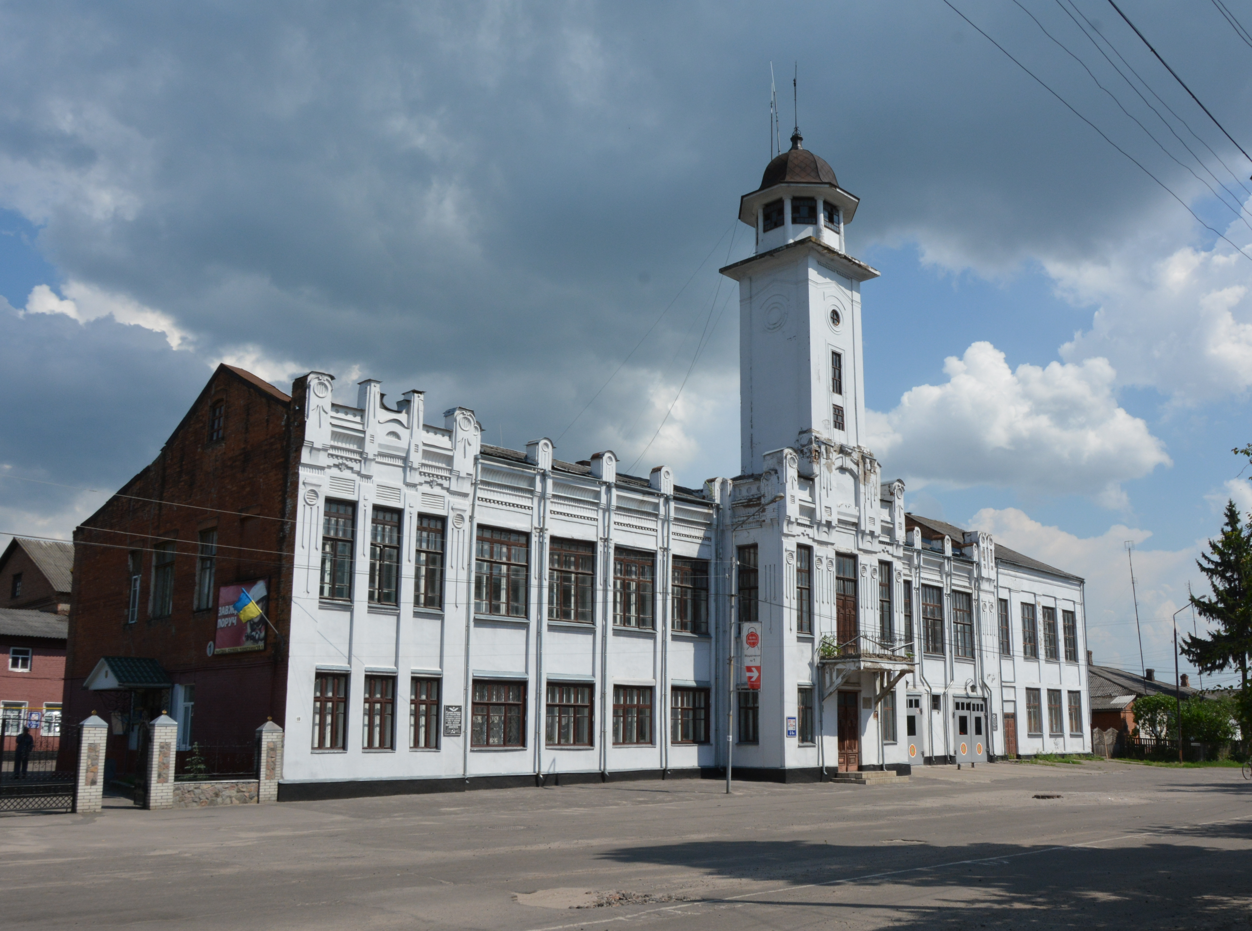 Міська управа (мур.), Лебедин, пл. Інтернаціональна, 11 (10)